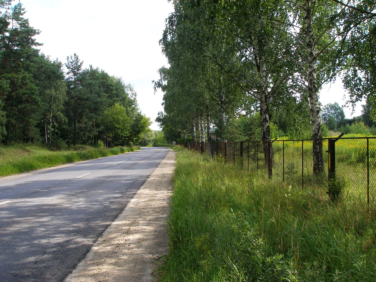 Улица Яунциема гатве в Букулты. Слева - Букултский лес, справа - бывшее хранилище торфа ТЭЦ I.